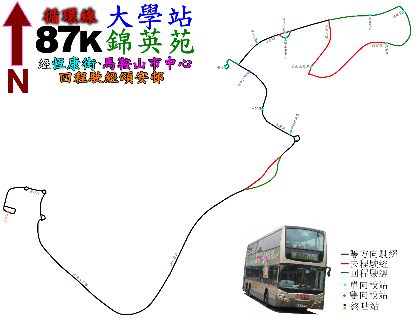 中文（香港）: 九巴87K線的走線圖